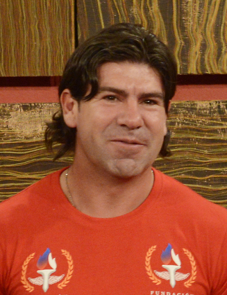 Marcelo Salas, exfutbolista chileno, en 2015.